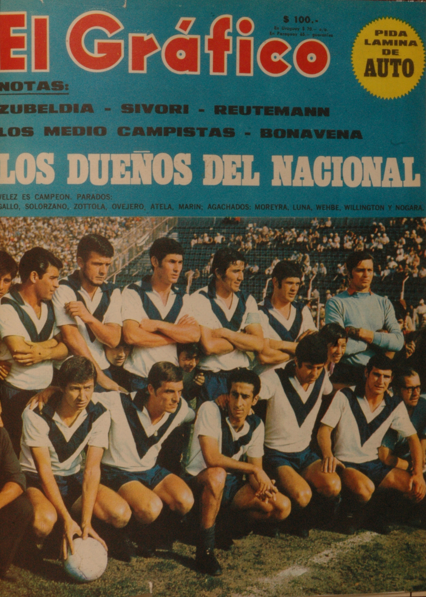 El Grafico del 31 de Diciembre de 1968. Edicion 2569